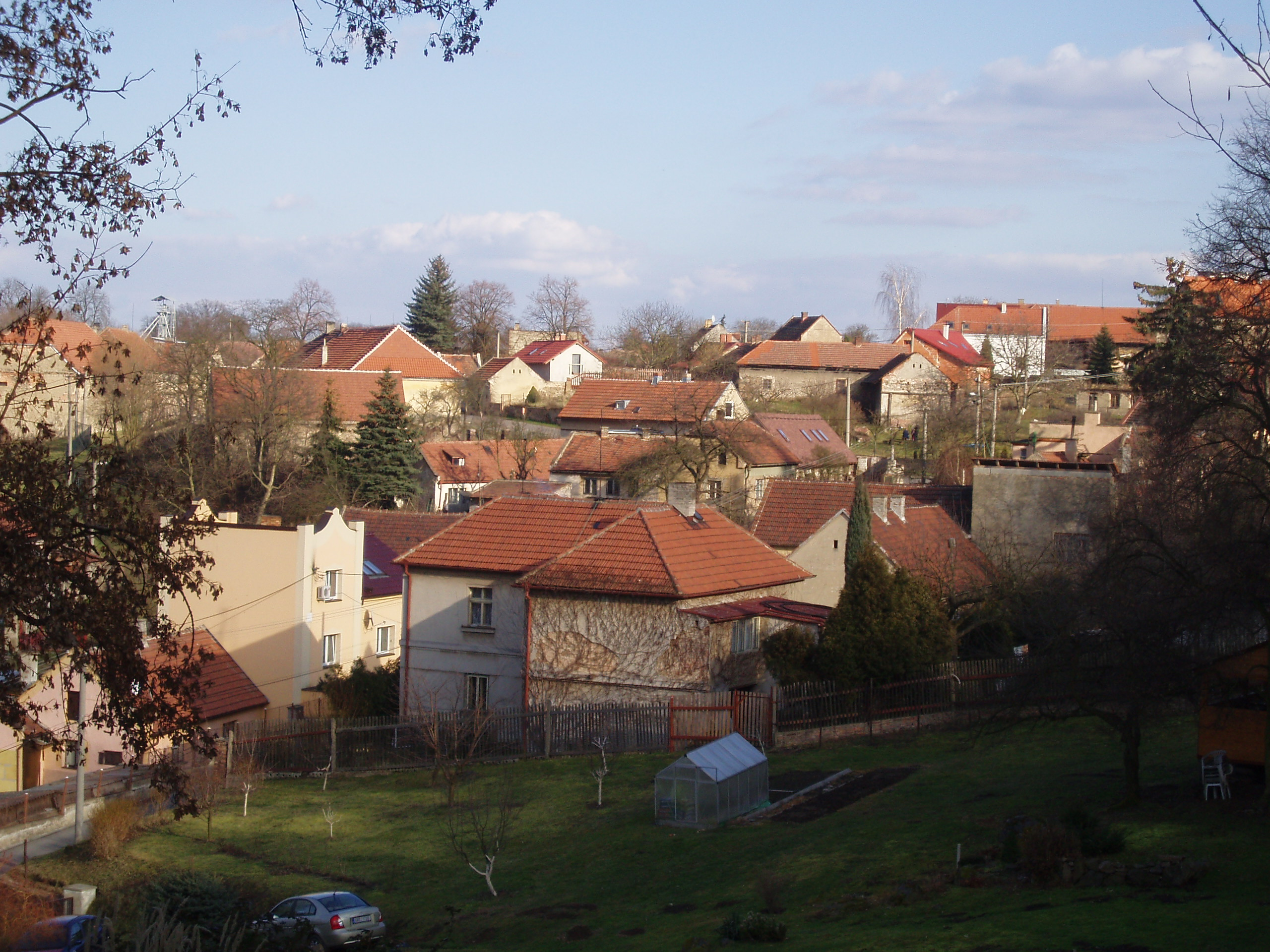 Trněný Újezd u Zákolan